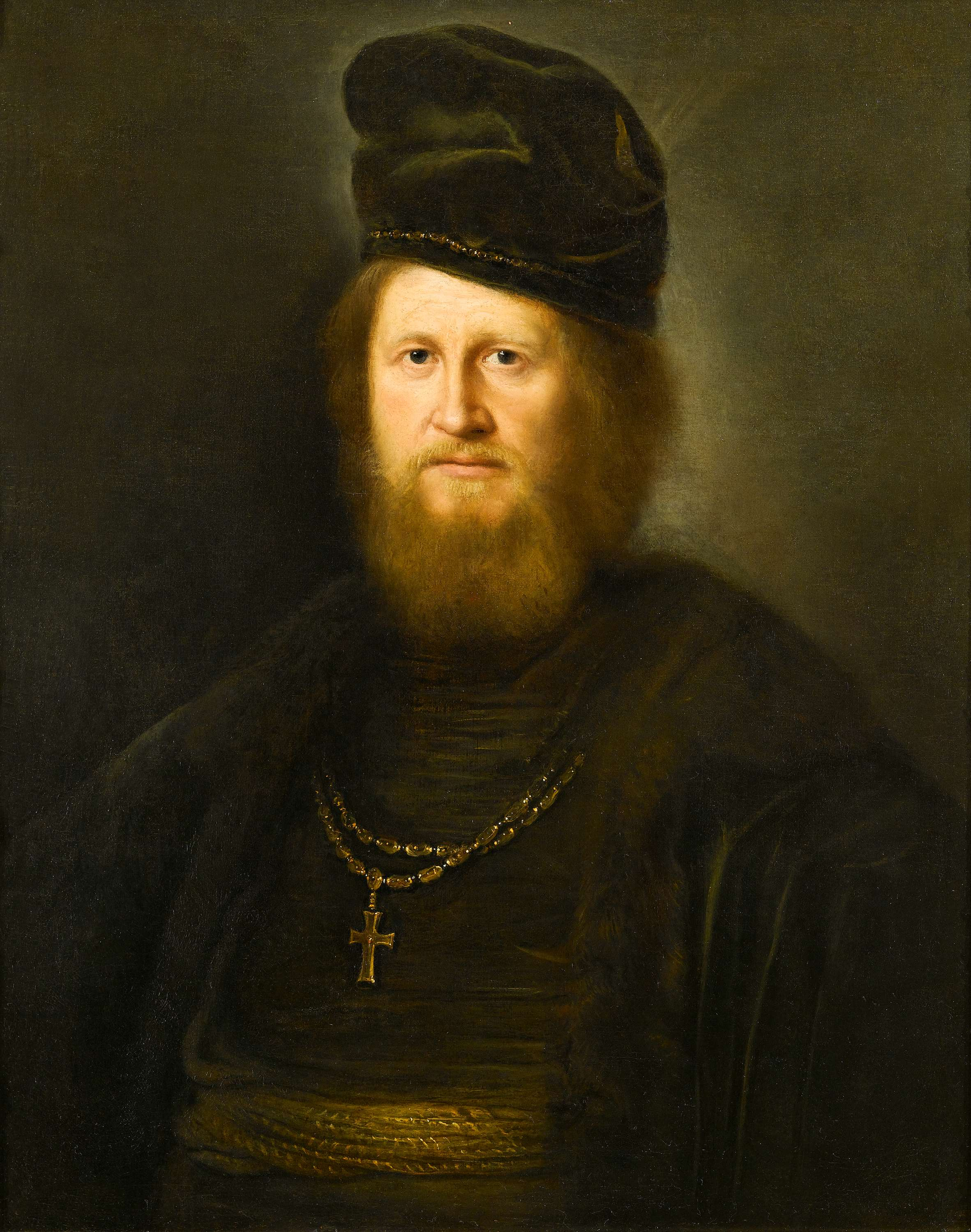 Portret brodatego kleryka – ok. 1650, 74 x 58,7 cm, Sphinx Fine Art, Londyn